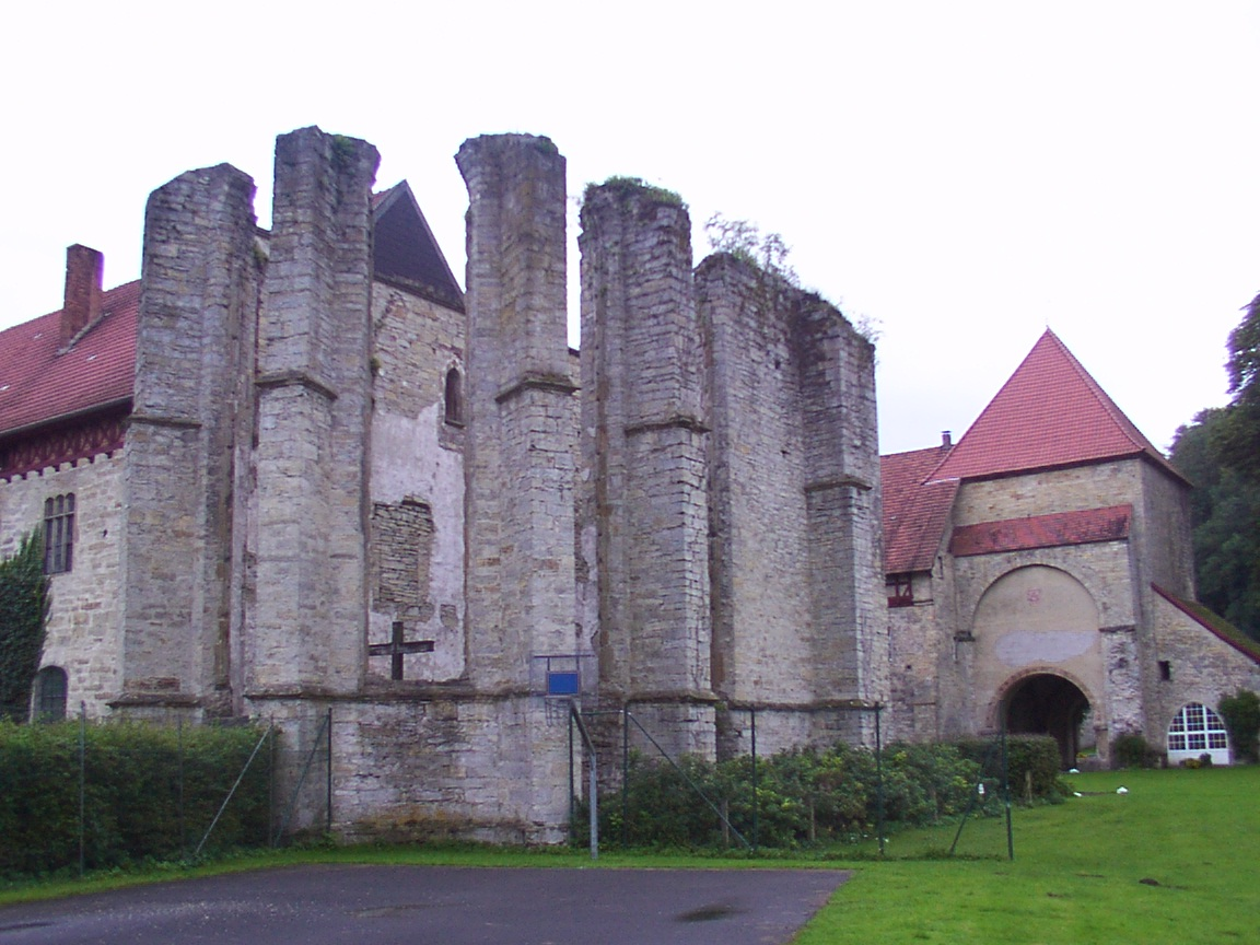 Büren (Westfalen): Gut Böddeken, Ruine der ehemaligen Klosterkirche, im Stadtteil Wewelsburg